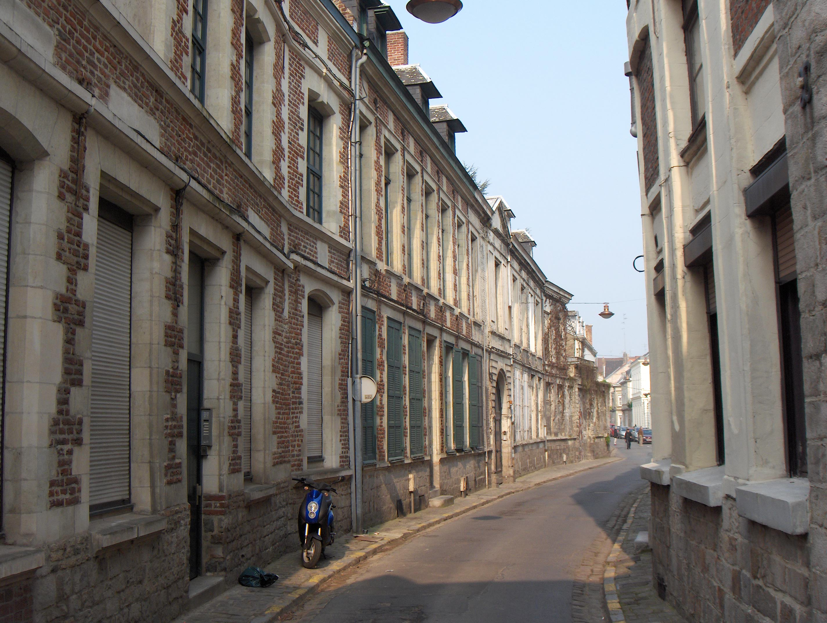 Valenciennes (dépt Nord, France), rue d'Oultremont (vue depuis la rue Delsaux).